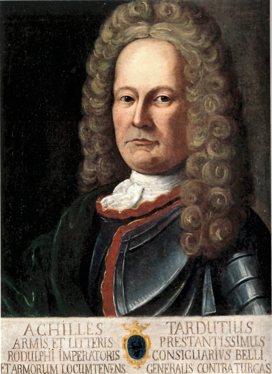 Dipinto attribuito ad un pittore di Corinaldo del secondo Settecento inizi Ottocento presente nella quadreria comunale di Corinaldo